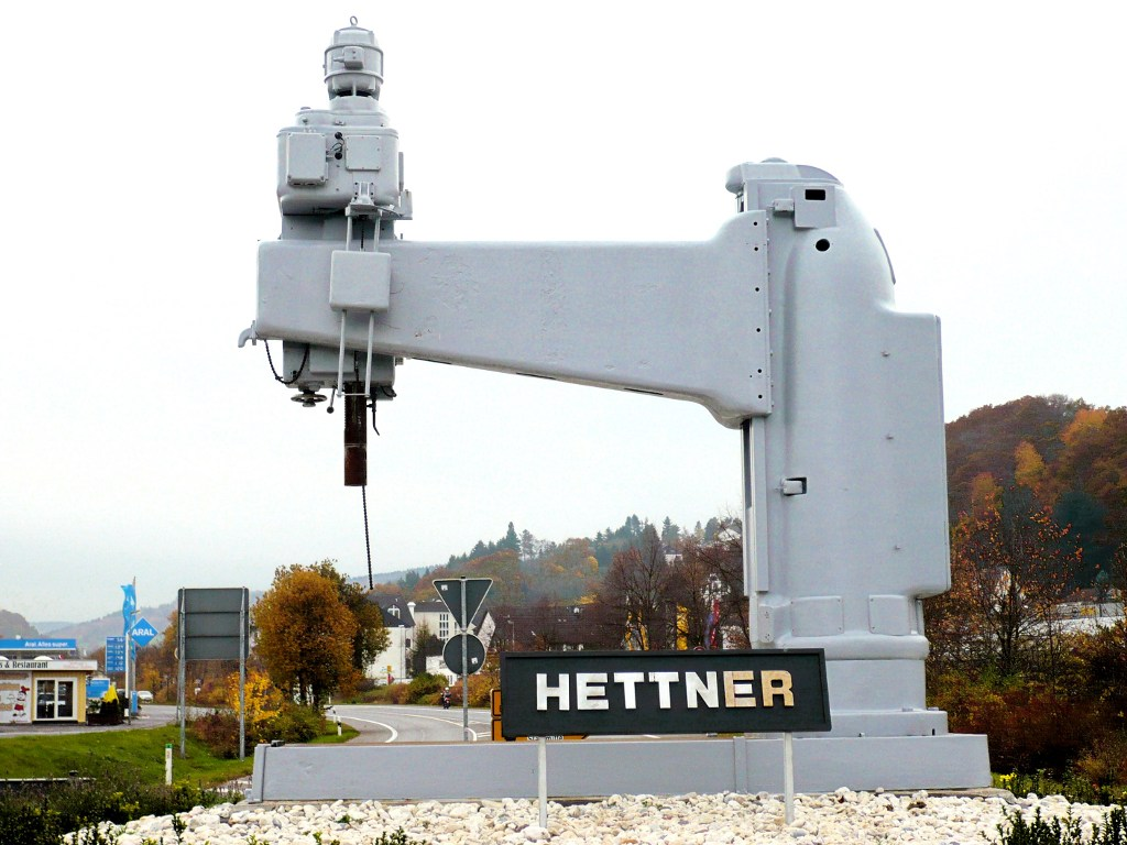 Hettner-Bohmaschine an der B51 im Stadtgebiet Bad Münstereifel